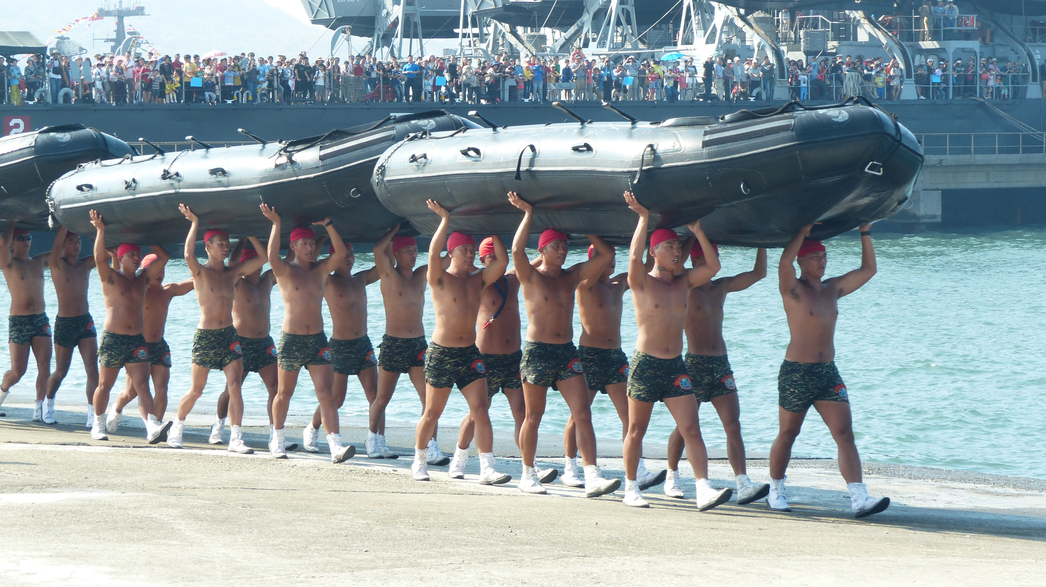 2014年左營軍港營區開放活動，上午海上操演，海陸蛙人高舉橡皮艇，呼口號進場。